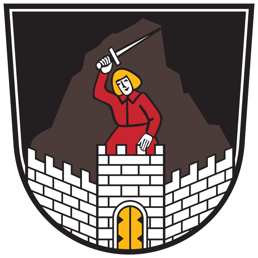 Wappen von Hüttenberg